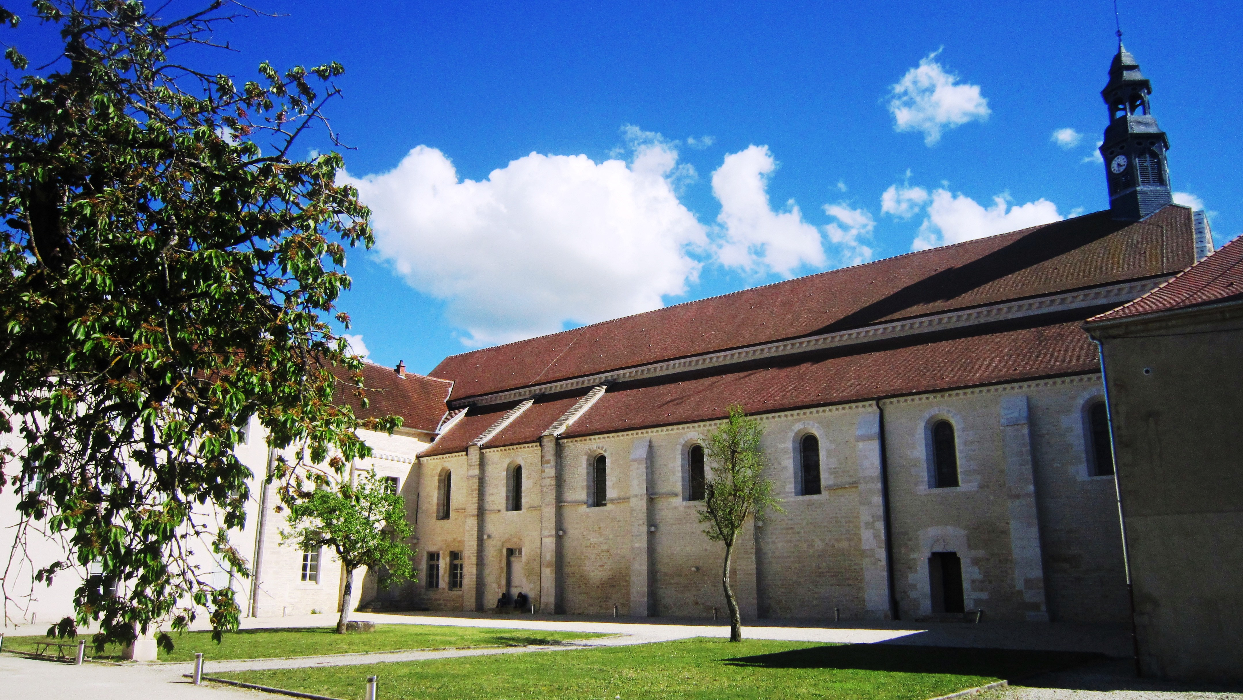 Façade nord de l'église Saint-Pierre